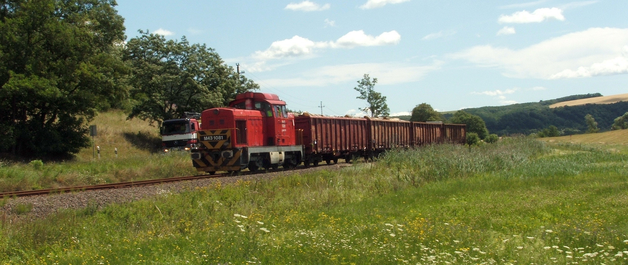 Tehervonat halad Mátramindszentről Kisterenye felé a Kisterenye–Kál-Kápolna-vasútvonalon; Maconka közelében, AS 27 sorompónál.